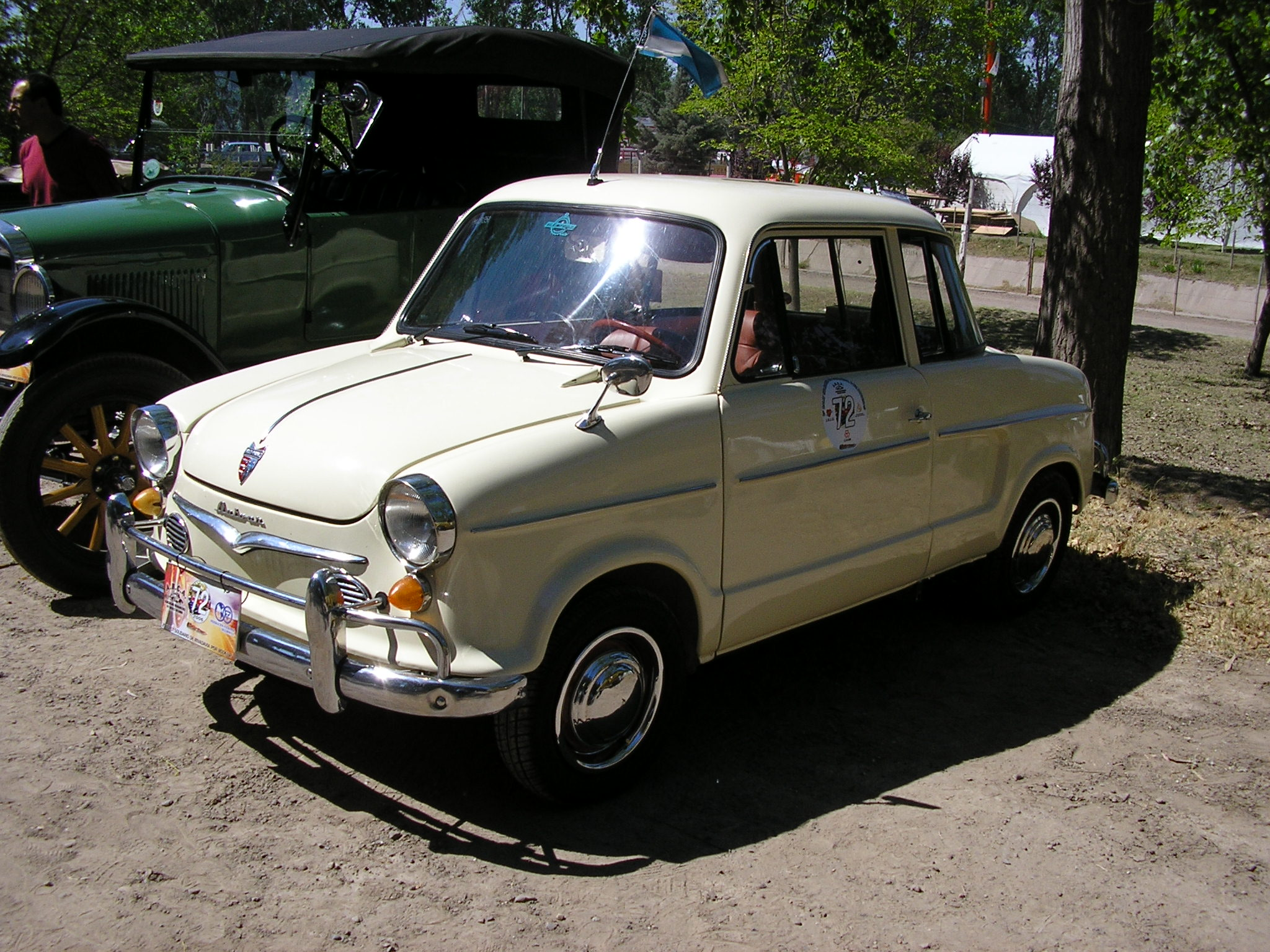 NSU Prinz hecho por Autoar en Argentina.